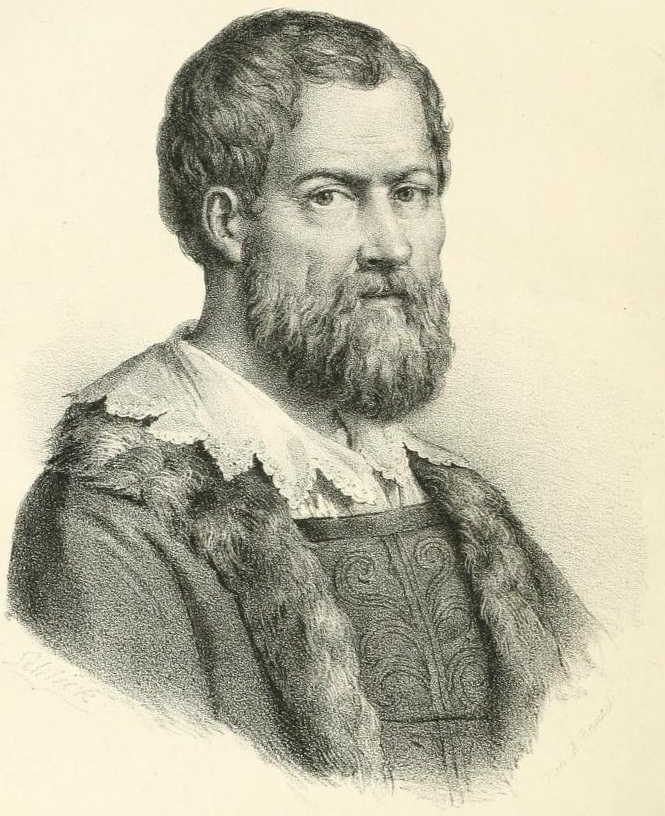 Ritratto di Matteo Maria Boiardo.